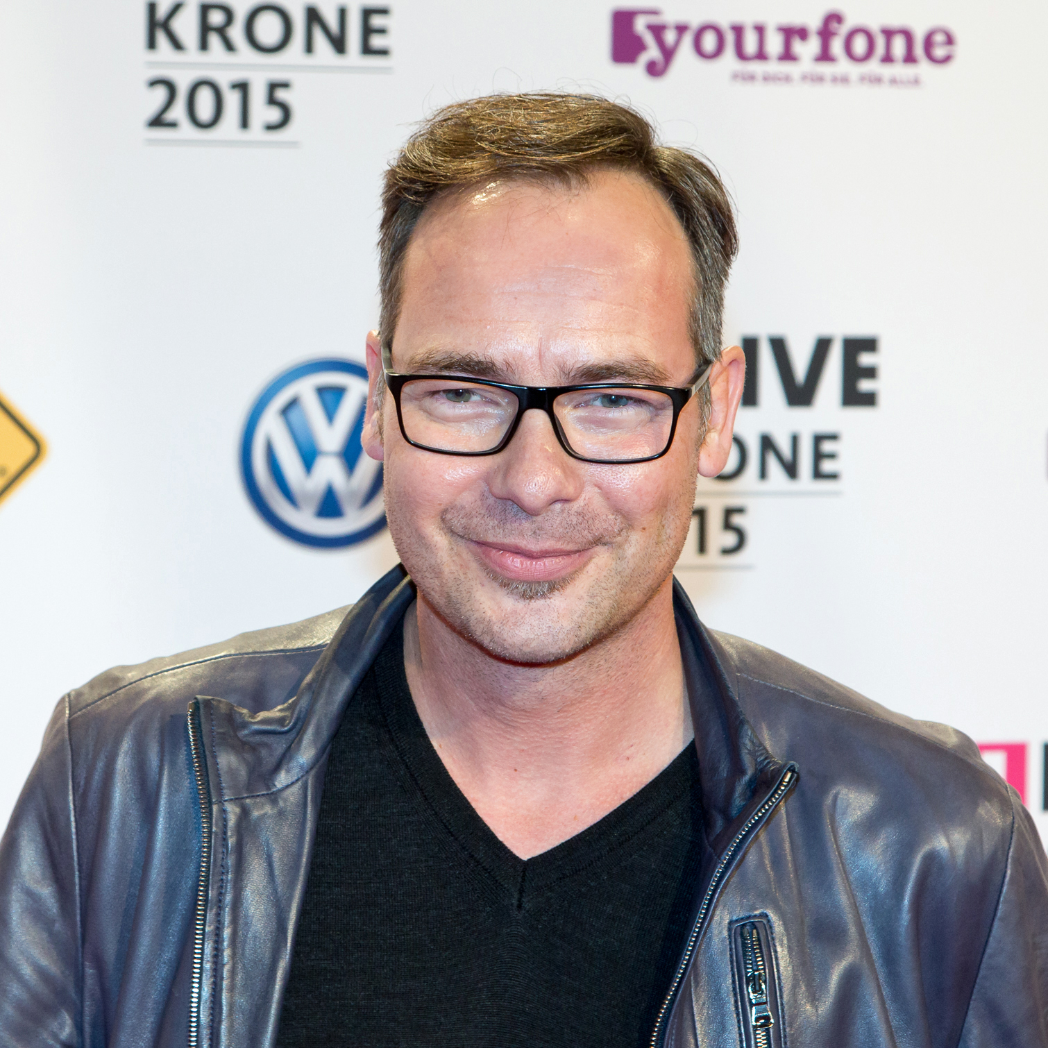 1liVE Krone 2015 - Matthias Opdenhövel